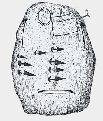 Stèle Bagnolo2